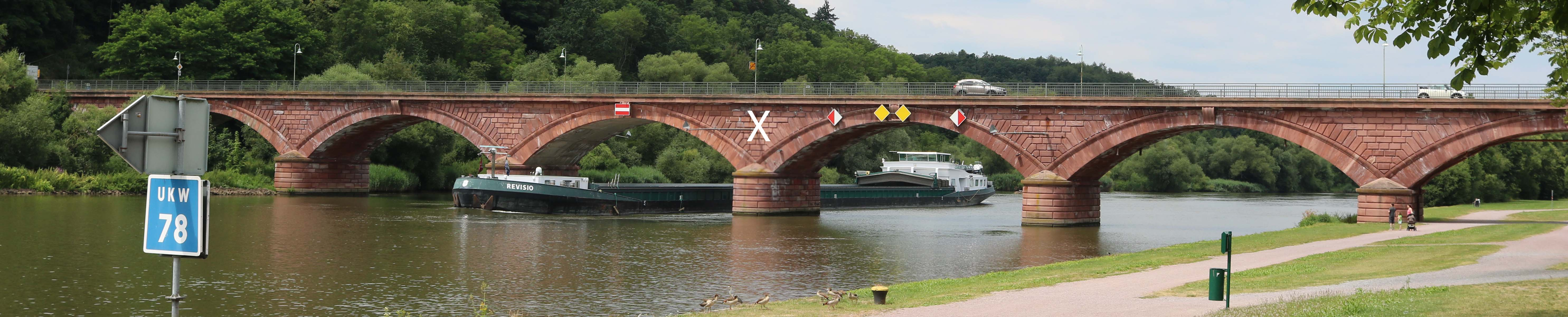 Mainbrücke, mittlerer Pfeiler markiert. Der Mittelpfeiler soll entfernt werden.